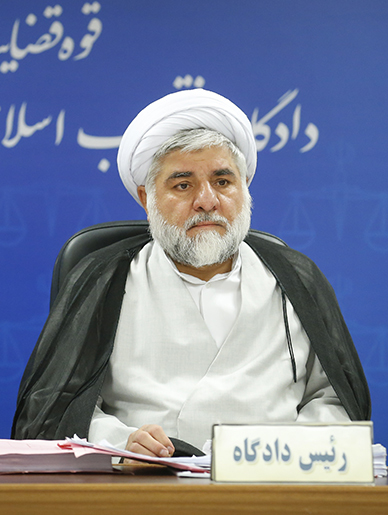 قاضی محمد مقیسه در سیزدهمین جلسه محاکمه دو متهم پرونده فساد نفتی